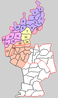 福岡県三潴郡の町村制時点の町村。